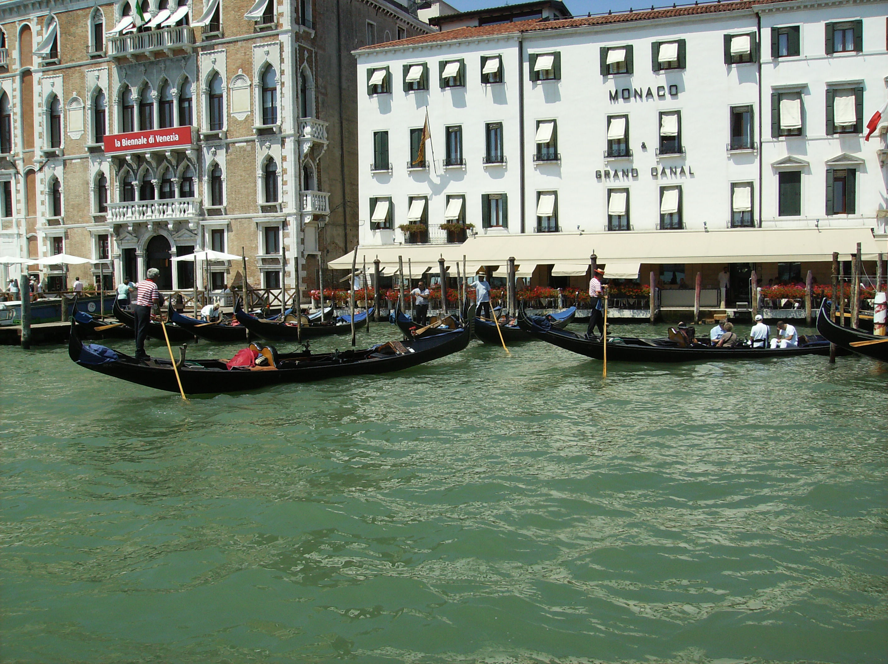 Venise-Hotel Monaco Gran Canal